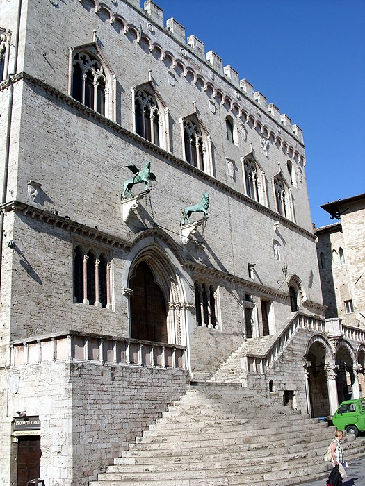 Perugia - Palazzo dei Priori